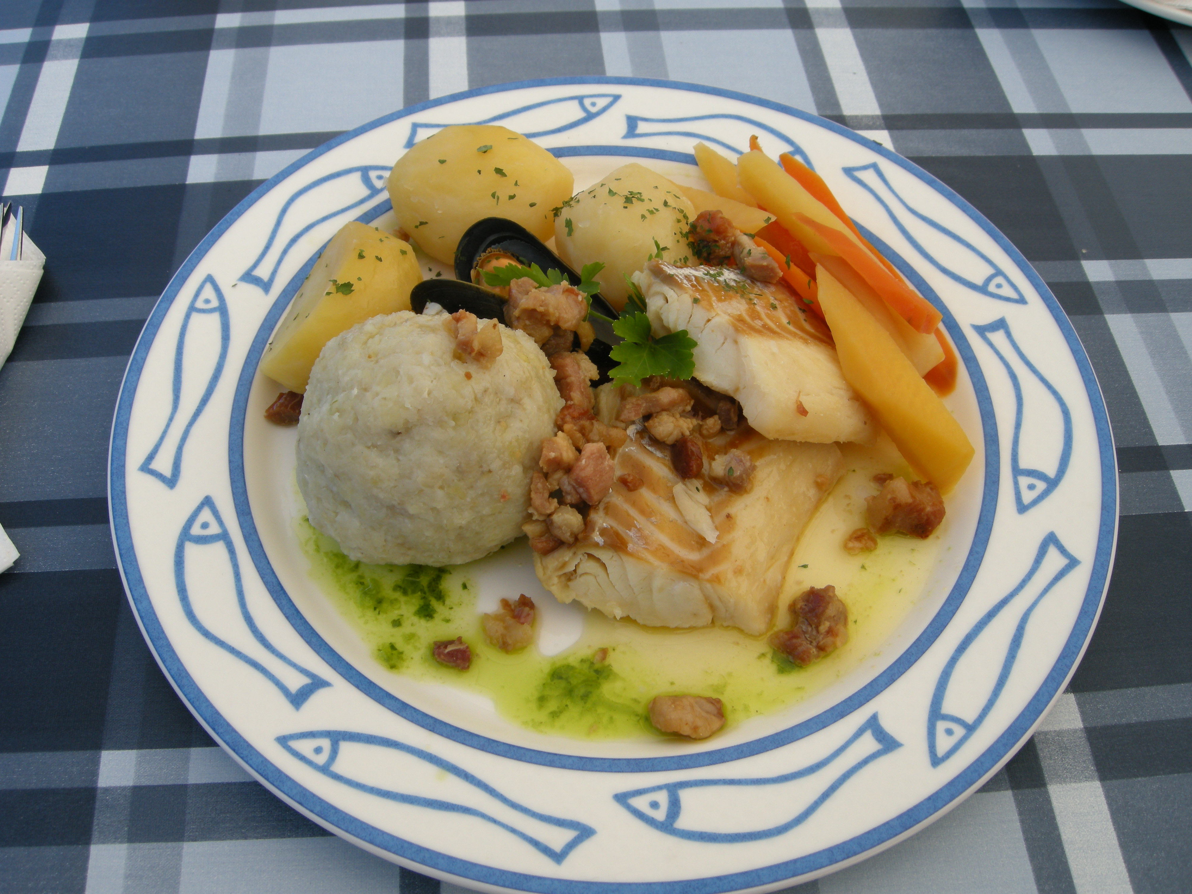 Blandaball, avkokt klippfisk, gulrot, kålrot, bacon, blåskjell - Kristiansund